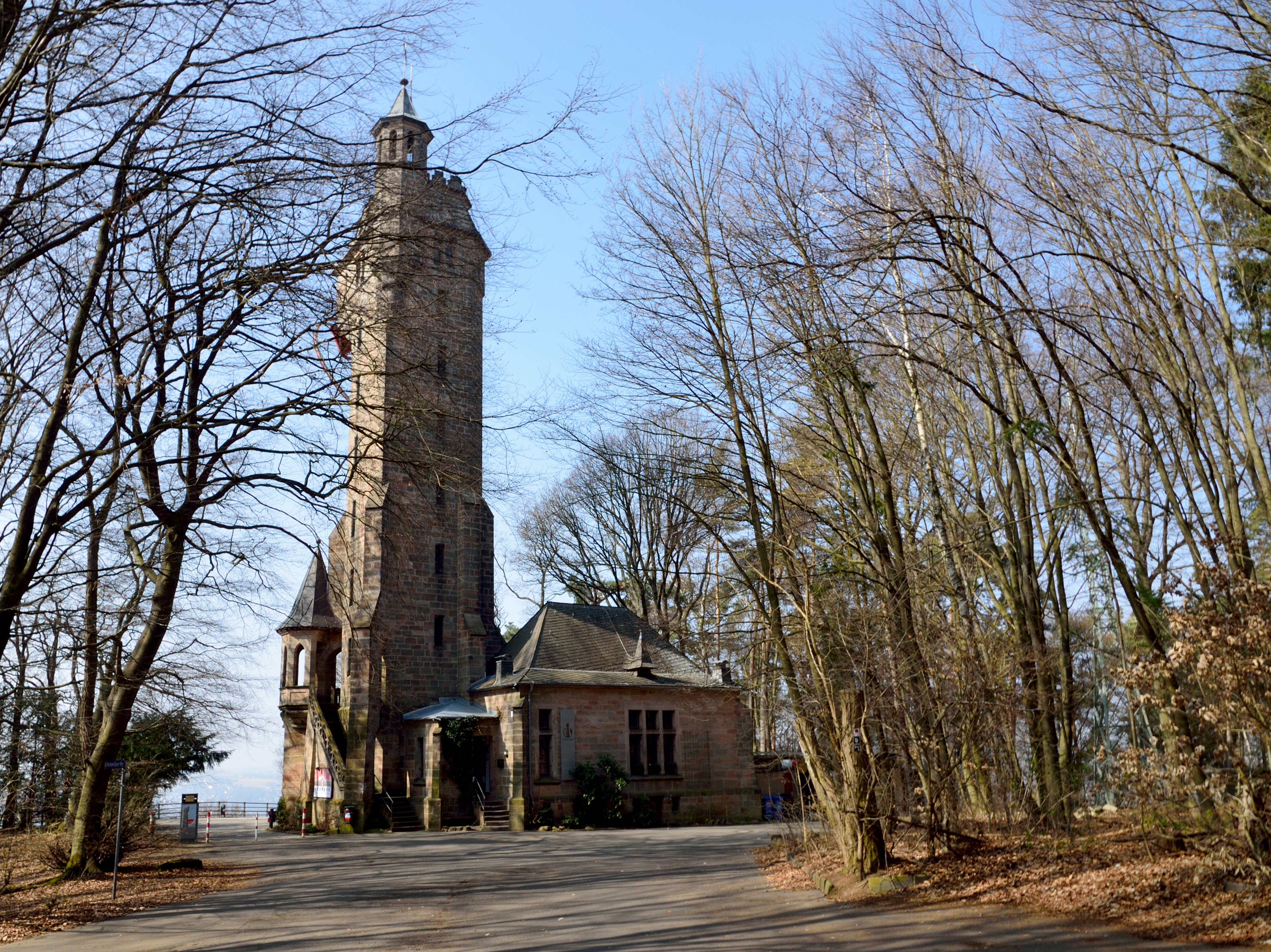 Der Spiegelslustturm auf den Marburger Lahnbergen, Rückseite